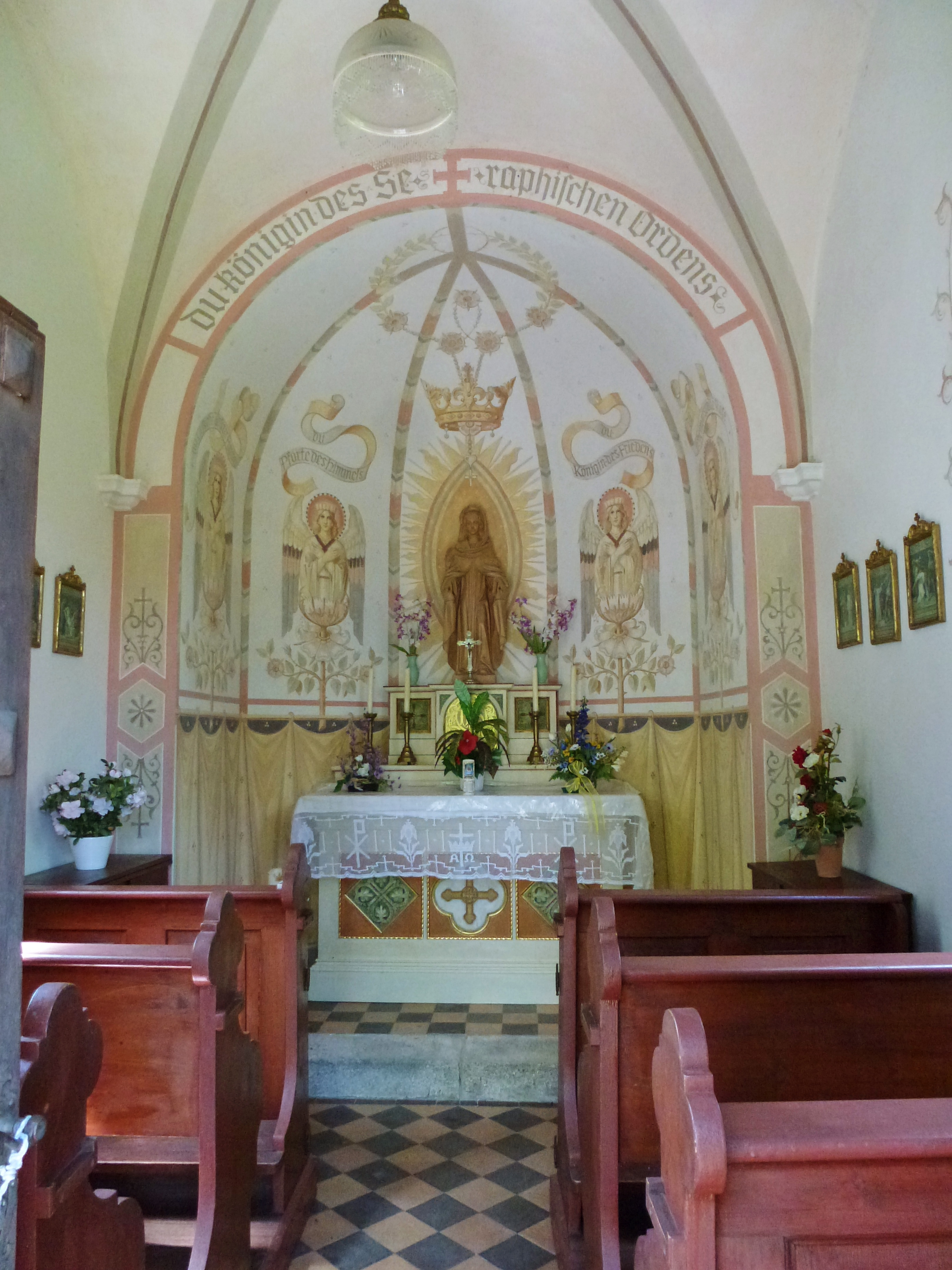 Schondorf, Ecke Seestraße / Kapellenberg. Innenansicht